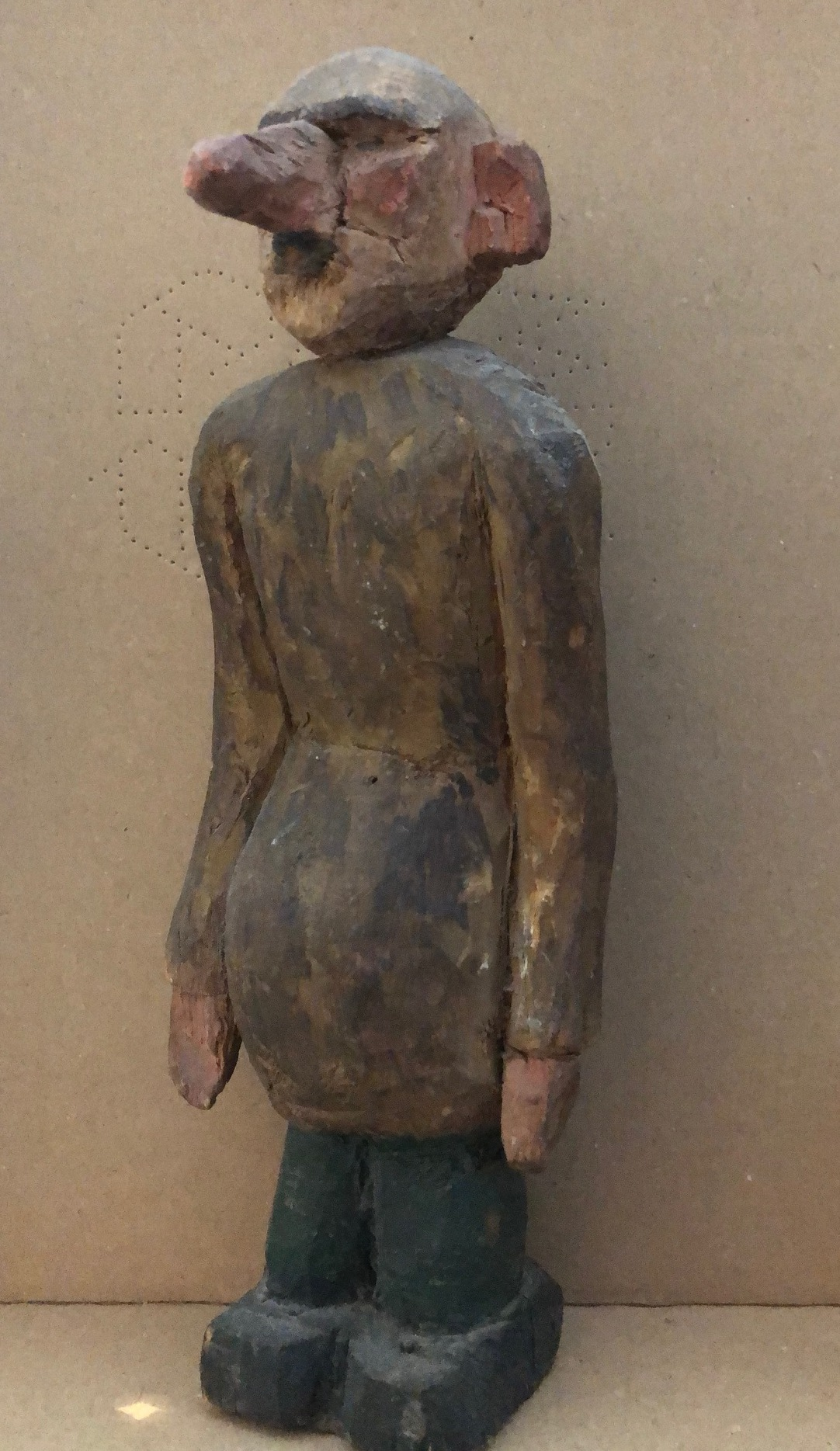 Myrte en de Demonen Manfiguur gesneden voor het draaiorgel van Bokkel en Nokkel